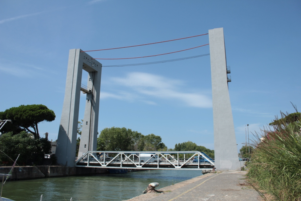 El Puente Due Giugno es un puente móvil de elevación vertical ubicado en la ciudad italiana de Fiumicino